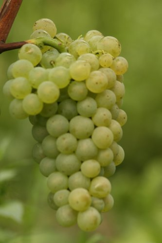 Scheurebe (A white vine)